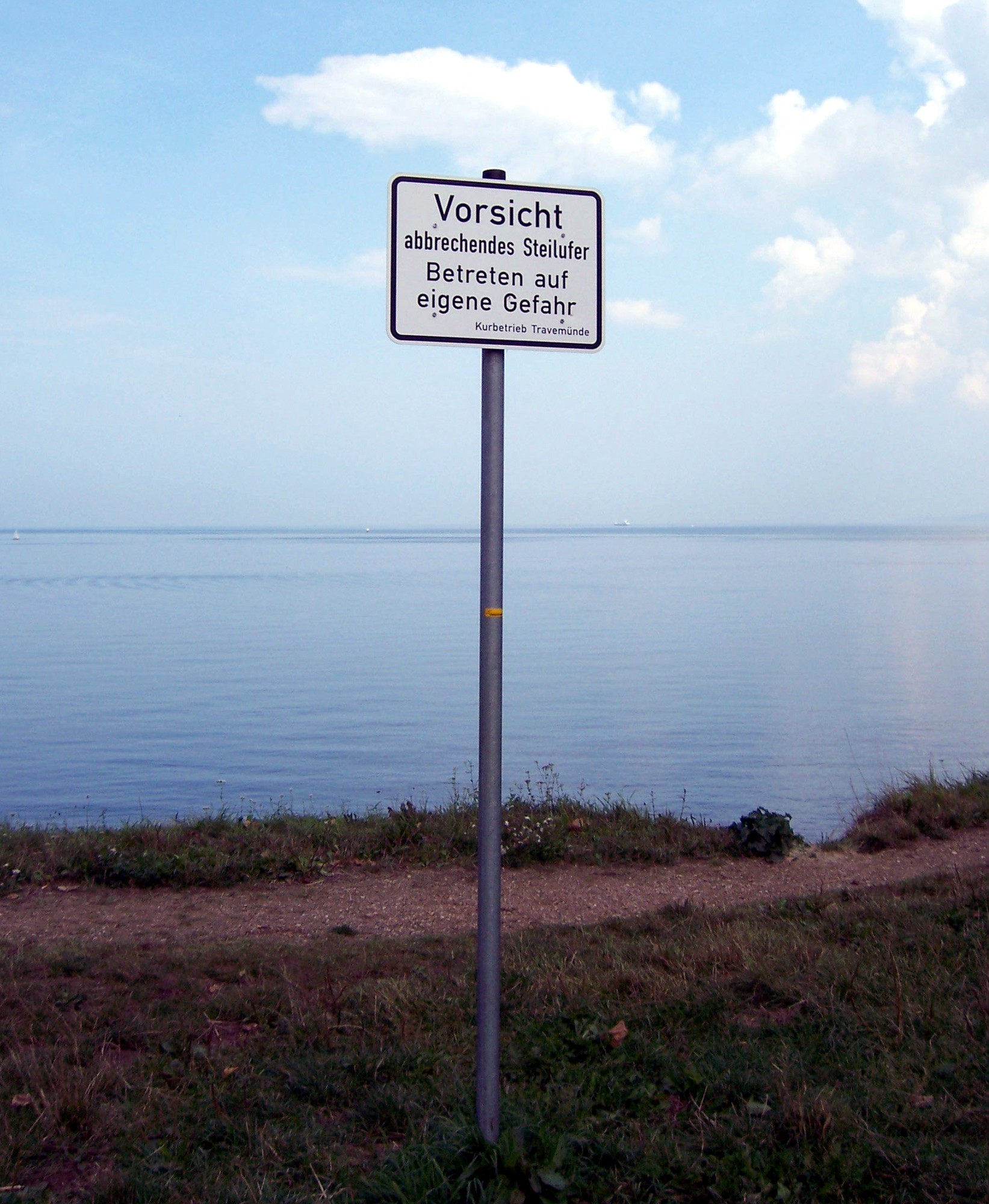 Brodtener Ufer zwischen Travemünde und Niendorf.